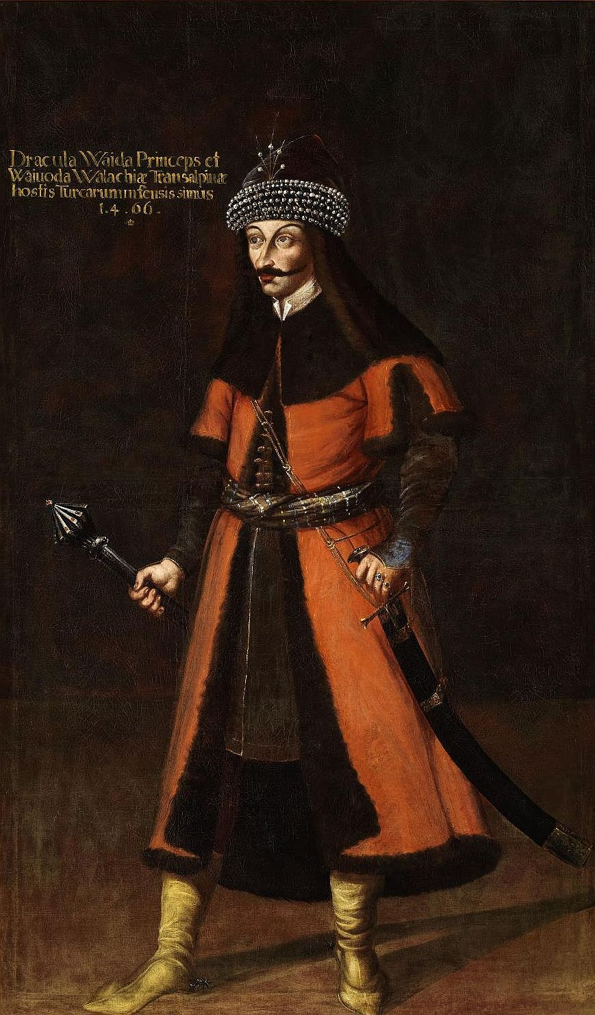 Lebensgroßes Bildnis aus der Esterházy‘schen Ahnengalerie von Burg Forchtenstein/Burgenland.